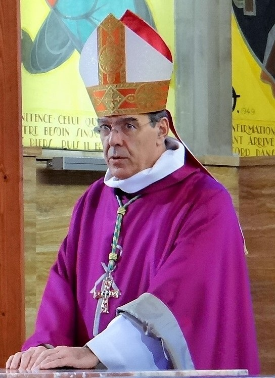 Mgr Michel Aupetit lors de la consécration du nouvel autel de l'église Saint-Jacques le Majeur à Montrouge